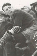 Hugo Laitner (1901-1993), československý hokejový útočník